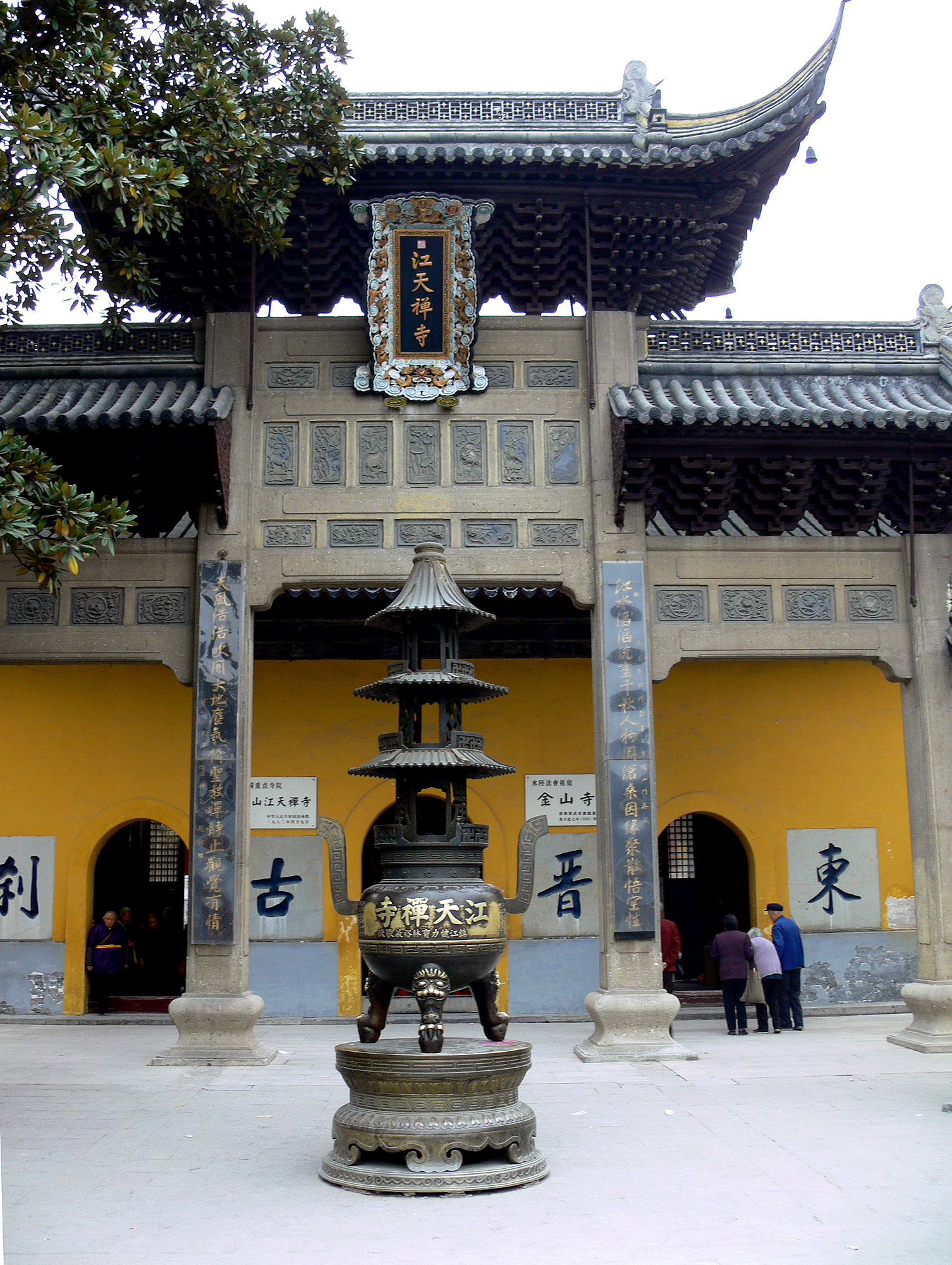 Jinshan temple, Zhenjiang 镇江金山寺